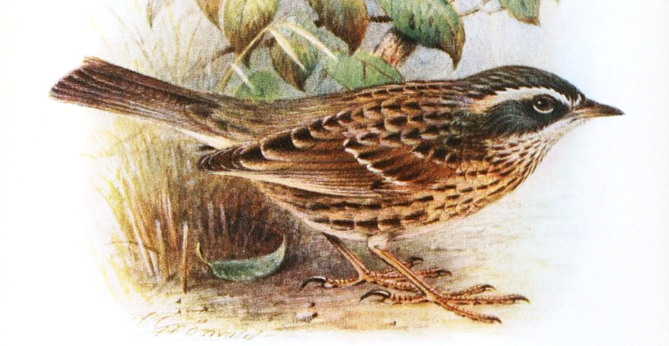 Prunella fagani